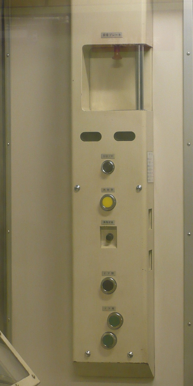 都営6300形スイッチ、なお、車両外から撮影